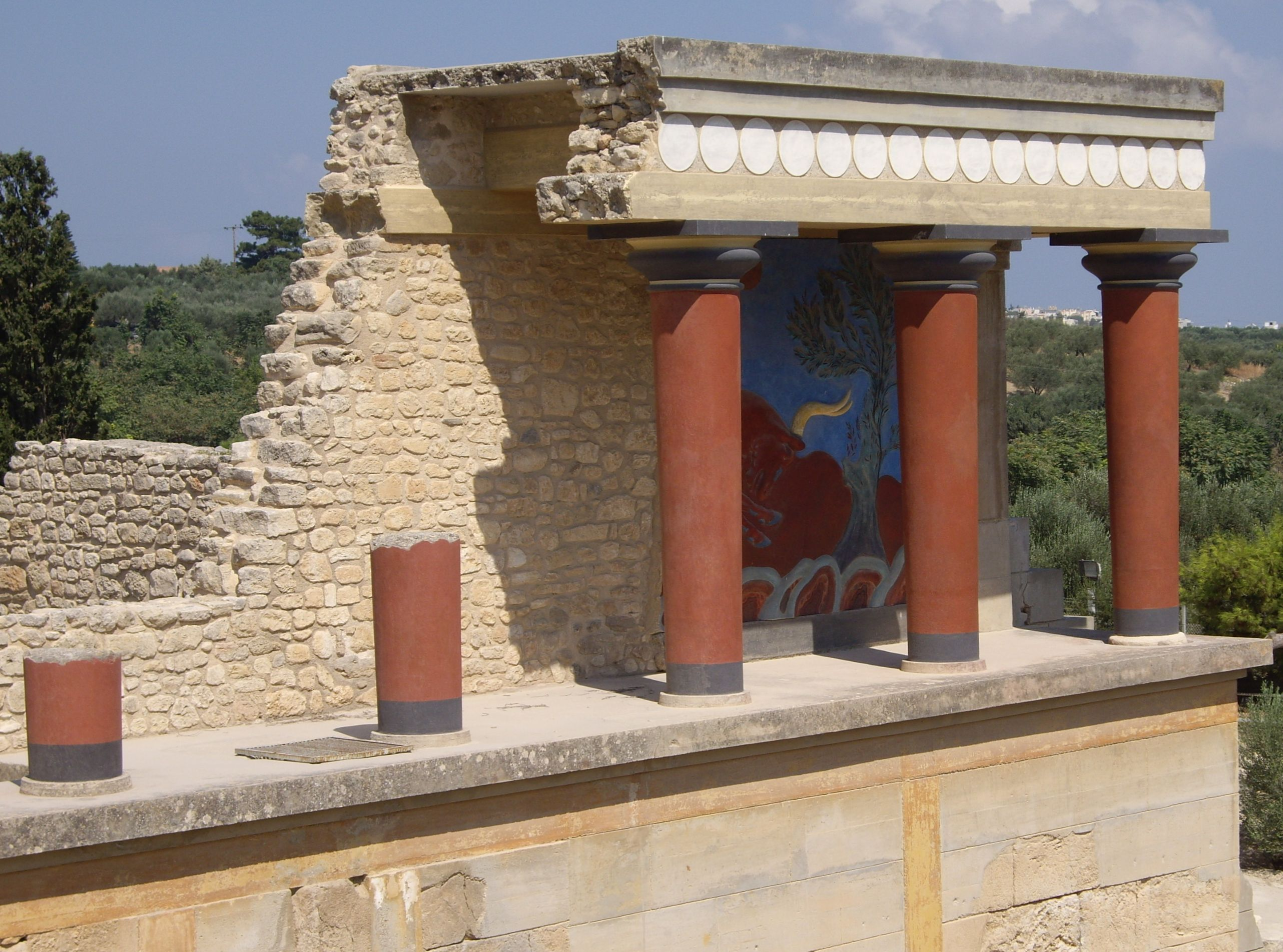 Knossos